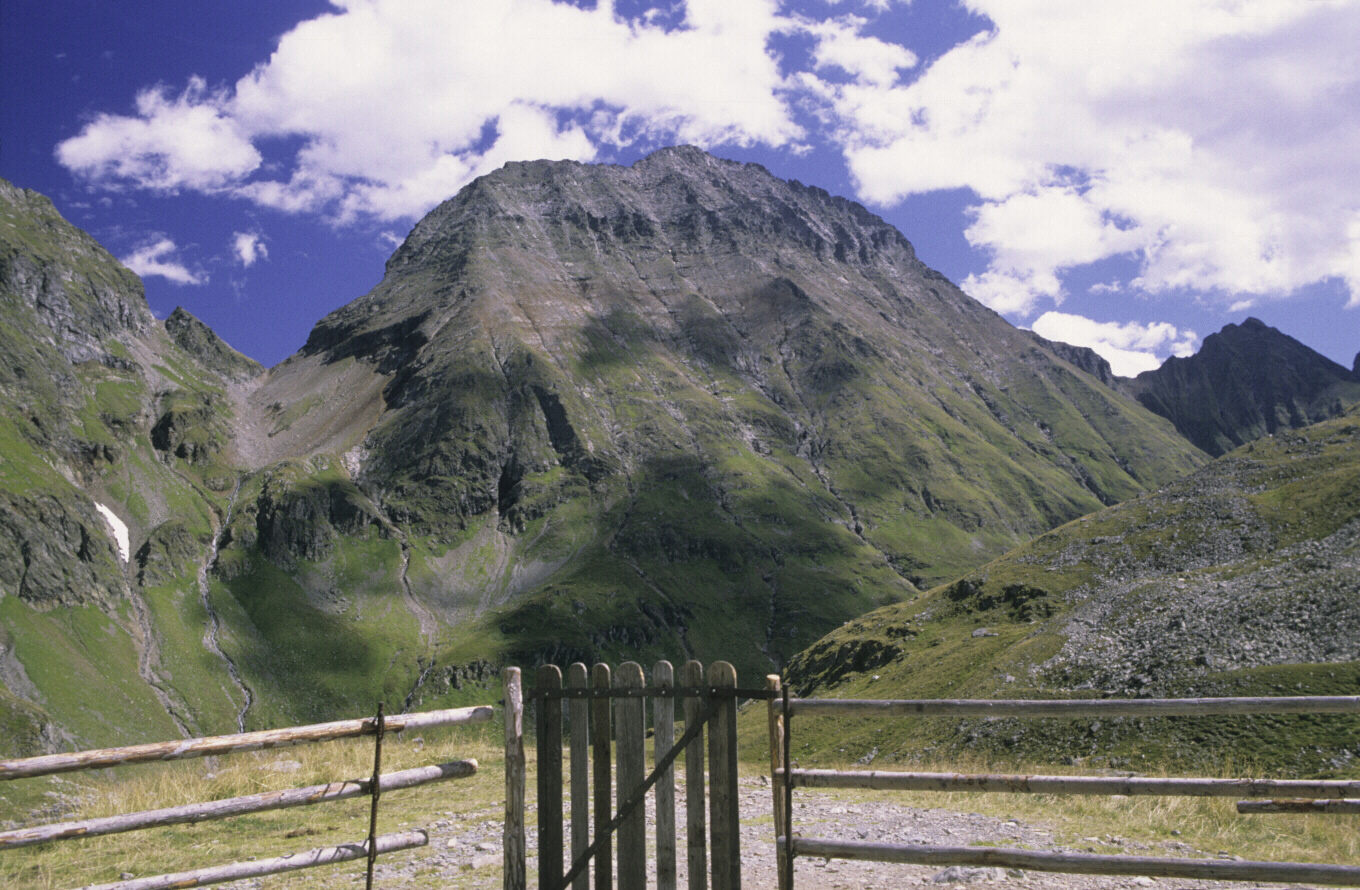 Hochgolling von Süden 1994, Schladminger Tauern, Österreich